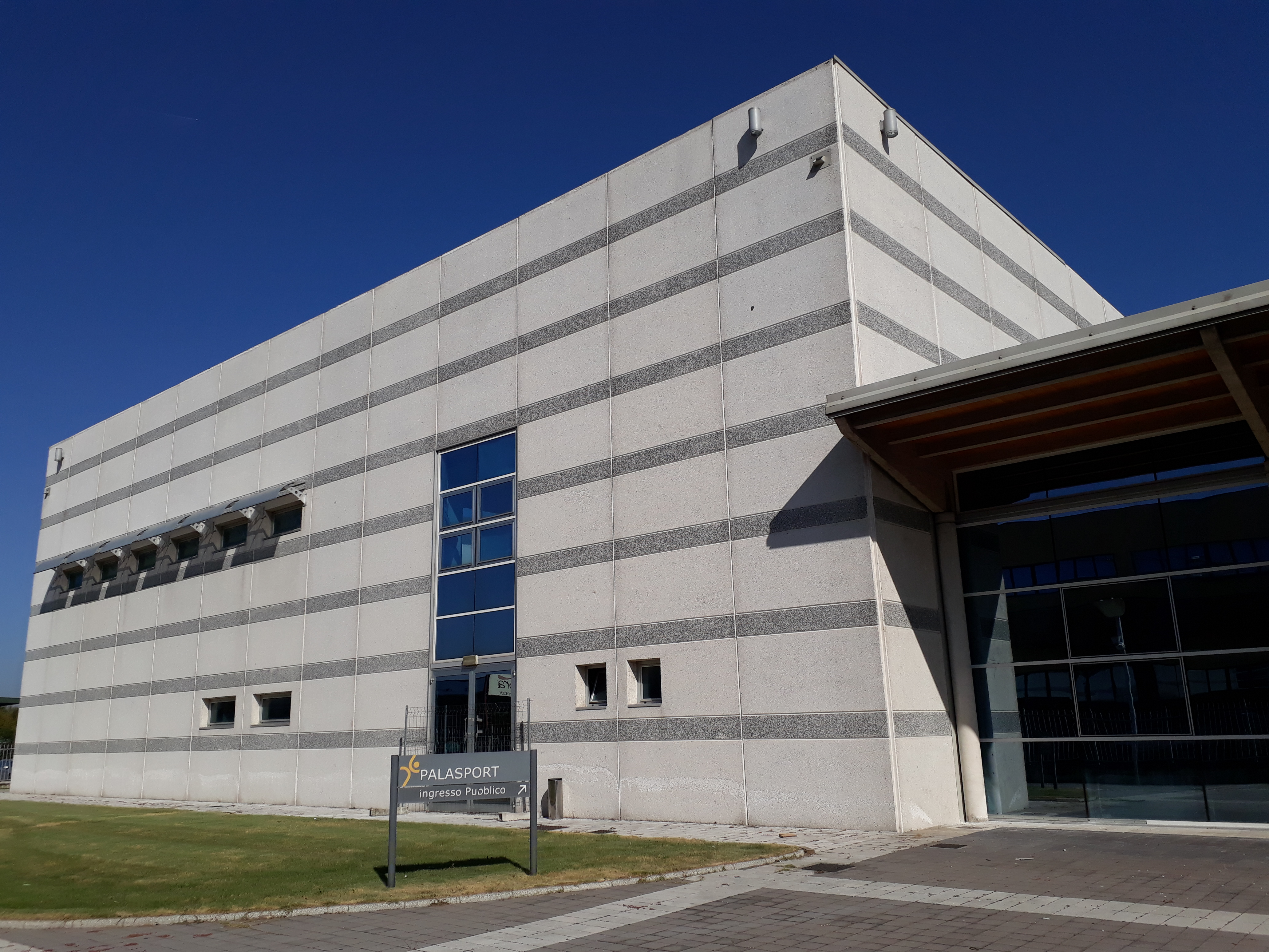 Palazzetto dello sport This is a photo of a monument which is part of cultural heritage of Italy.